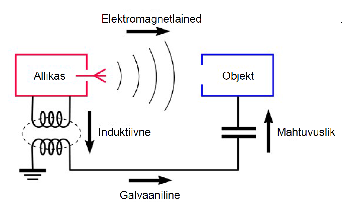 Fail EMI coupling modes.svg eestikeelse tekstiga